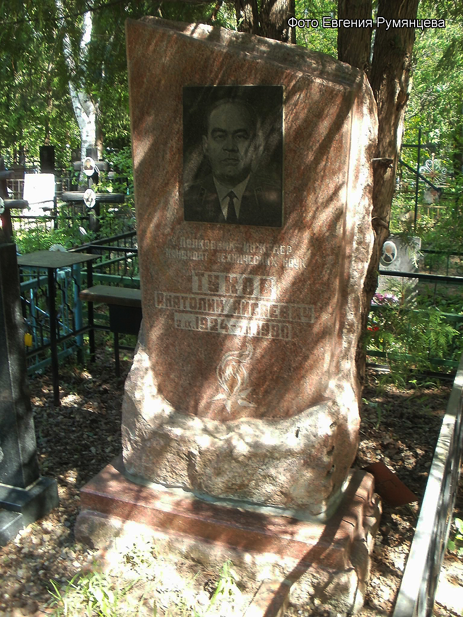 Надгробие на могиле А.А. Тукова (май 2012 года). Московская область, Пушкинский район, Невзоровское кладбище (уч. № 17)